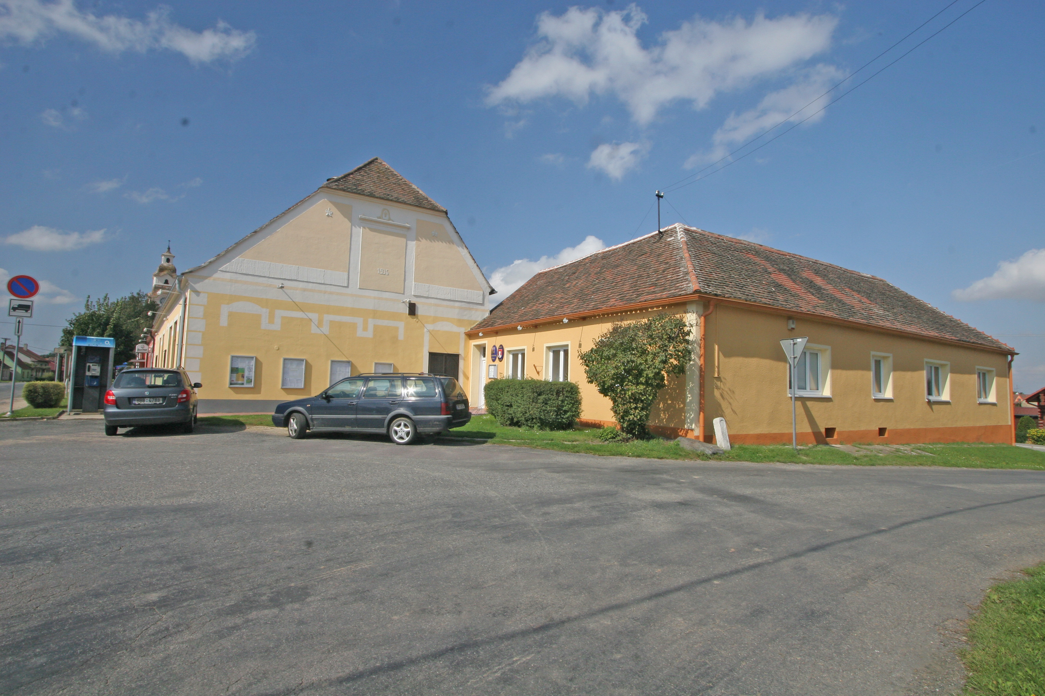 Štítary obecní úřad